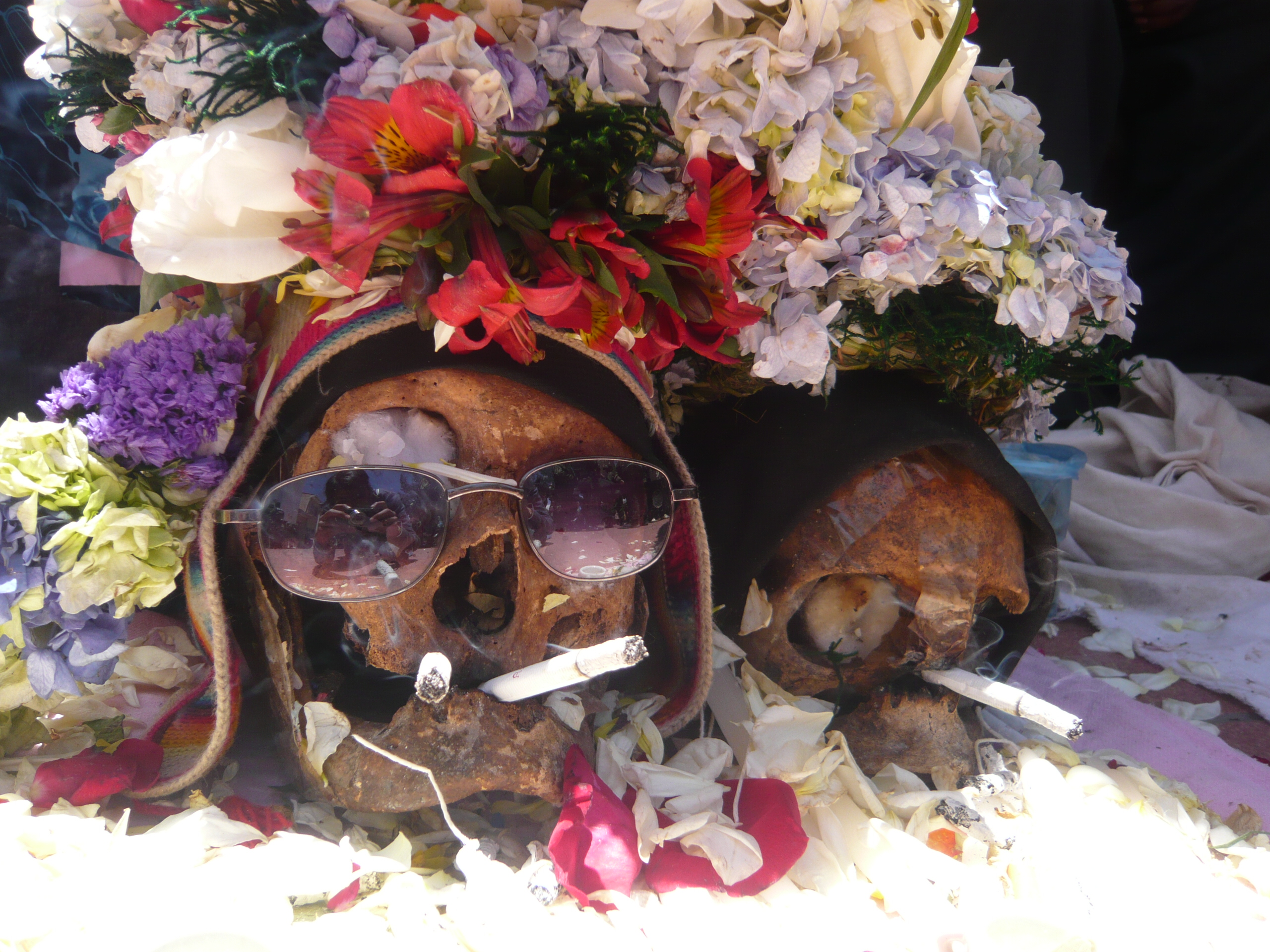 Ñatita con cigarrillo, corona de flores y gafas